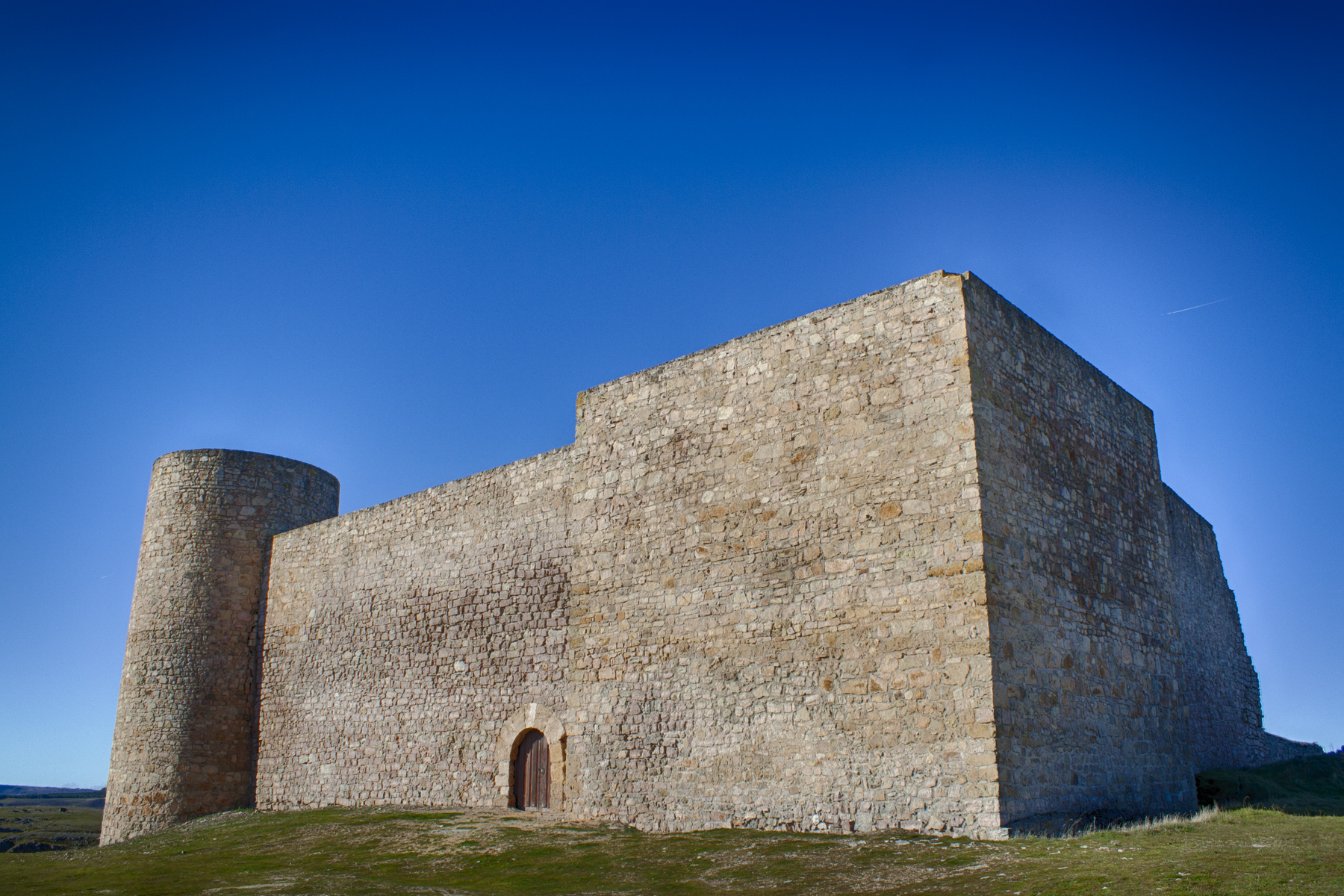 Castillo. Probablemente del siglo XIII o XIV Medinaceli Provincia de Soria Castilla y León España